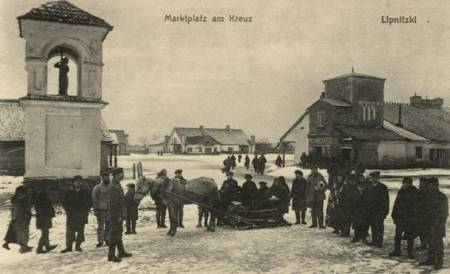 Беларуская (тарашкевіца): Ліпнішкі (Lipniški), пляц Рынак (plac Rynak)